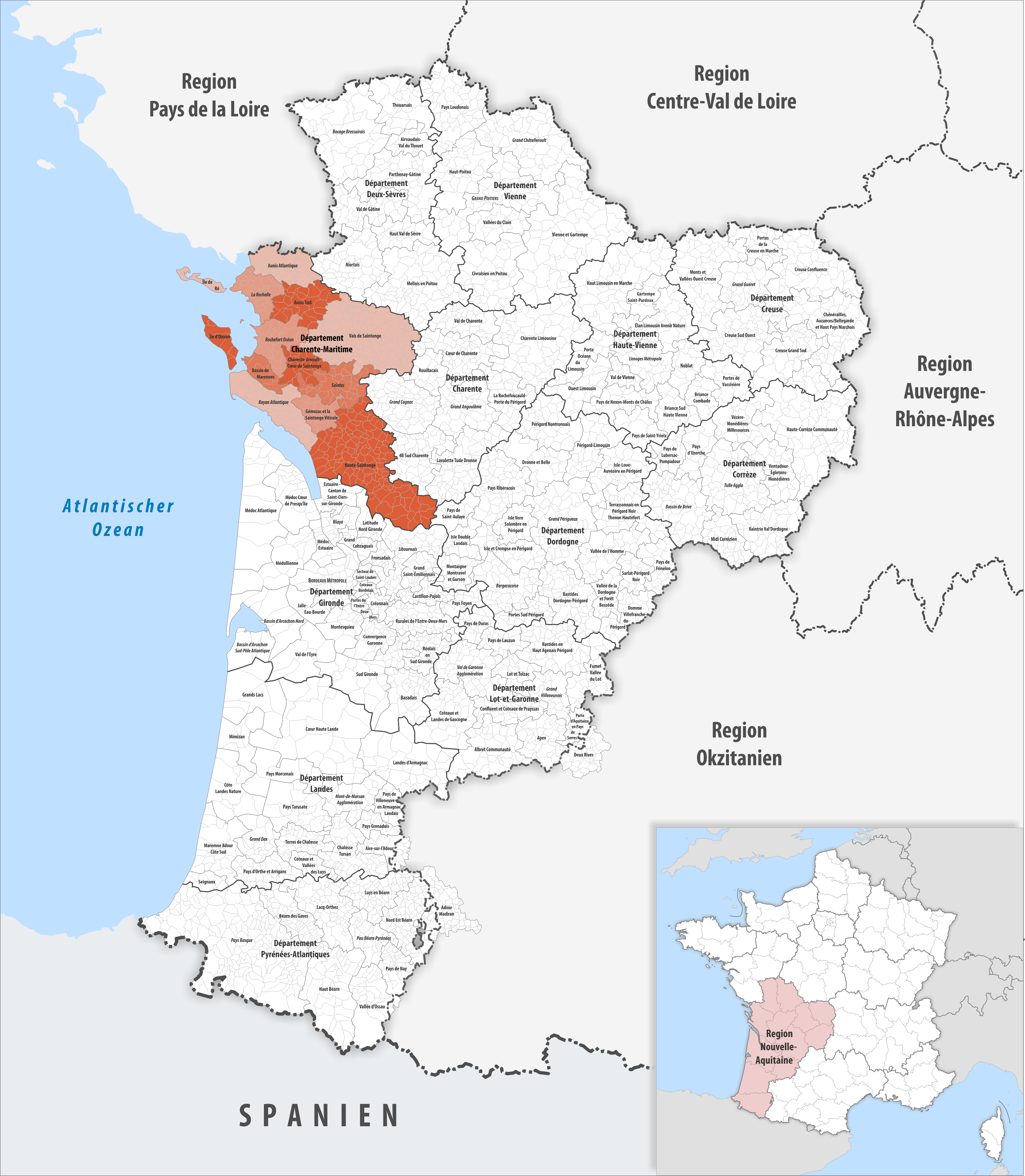 Gemeindeverbände im Département Charente-Maritime